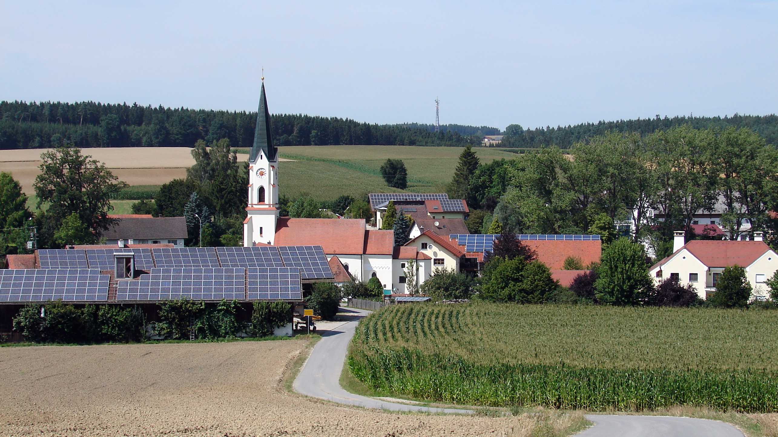 Diemannskirchen ist ein Ortsteil des Marktes Geisenhausen im niederbayerischen Landkreis Landshut.